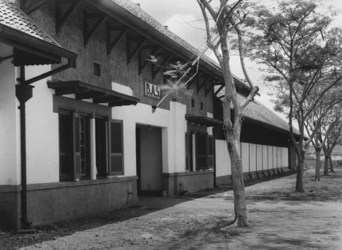 Foto. De Burger Ambachtsschool aan de B.A.S. straat